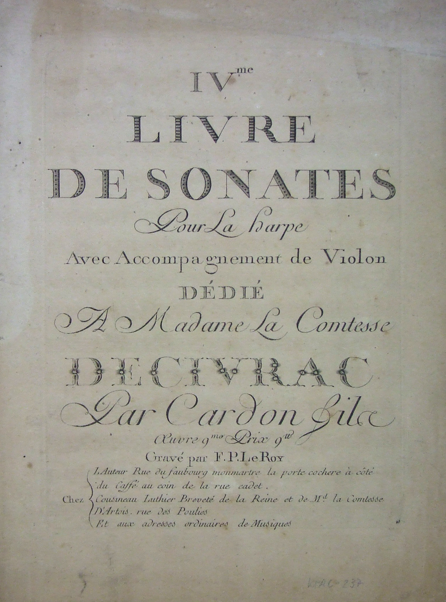 Ж.-Б. Кардон. 4я книга сонат для Арфы. 1780-е